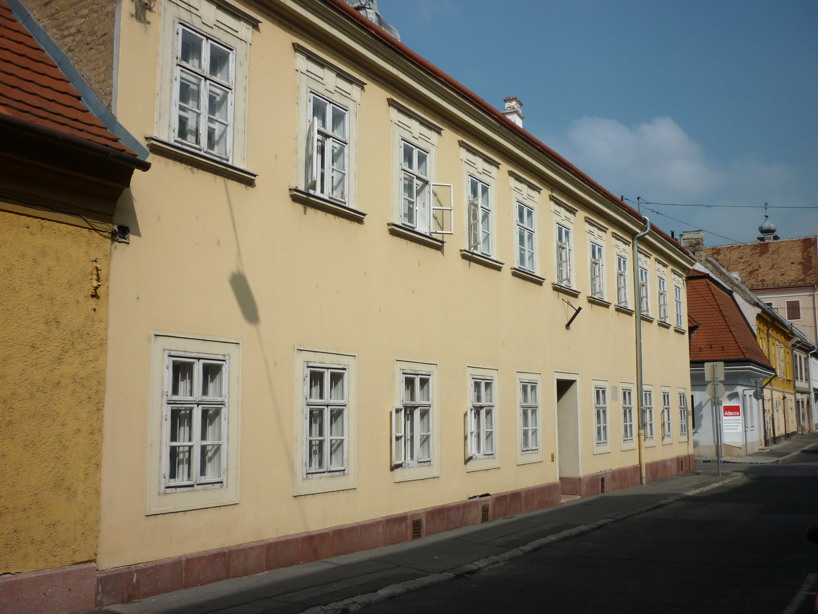 Német ispita (Győr, Vörösmarty Mihály utca 6., Apáca utca 27-31.) This is a photo of a monument in Hungary. Identifier: 4408